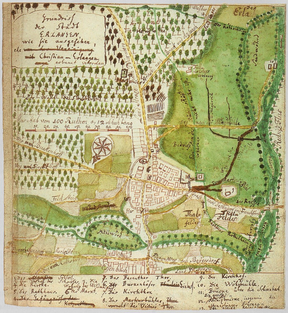 Grundriss der Stadt Erlangen vor 1686. Rekonstruktion um 1774/1778.